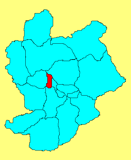 桥西区在张家口市的位置；此图片由王云峰wangyunfeng原创，用于WIKI。